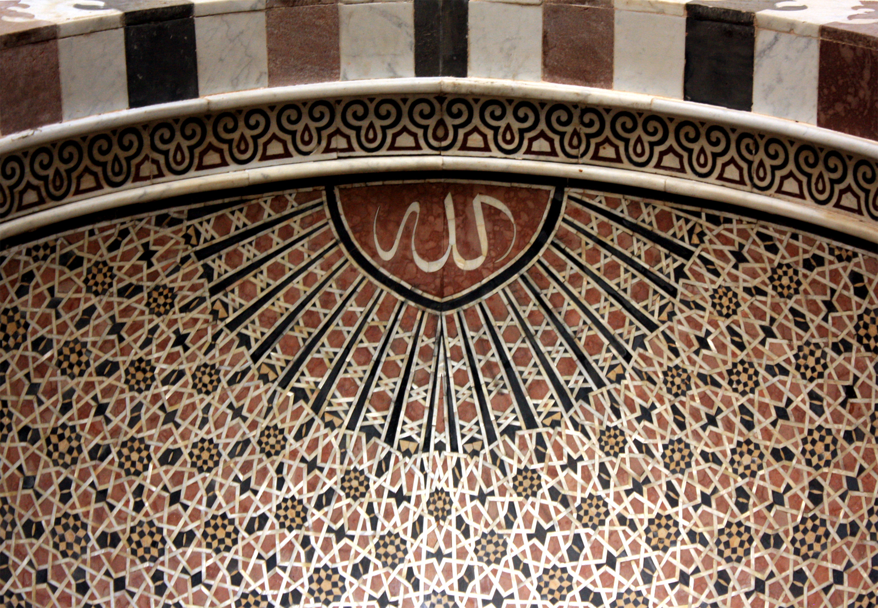 Sultan al-Nasir Muhammad ibn Qala'un Masjid. Mihrab closeup.